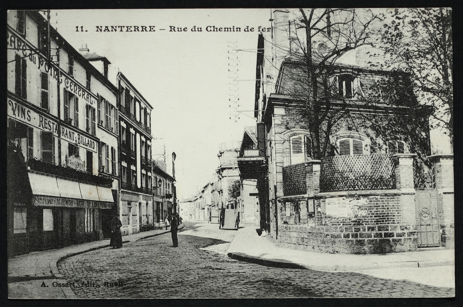 Nanterre.Rue du Chemin-de-Fer.Passants